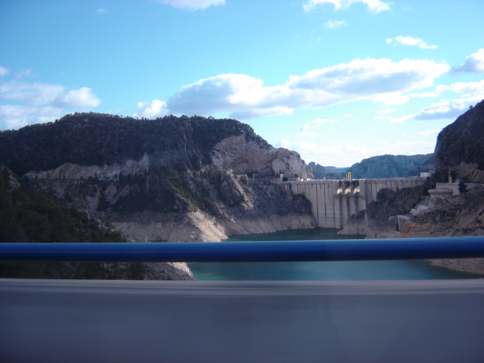 Autovía A-3. Fotografía tomada por richycruz desde el puente de la Autovía enfocando al antiguo puente de la Carretera Nacional III a su paso por el Embalse de Contreras.